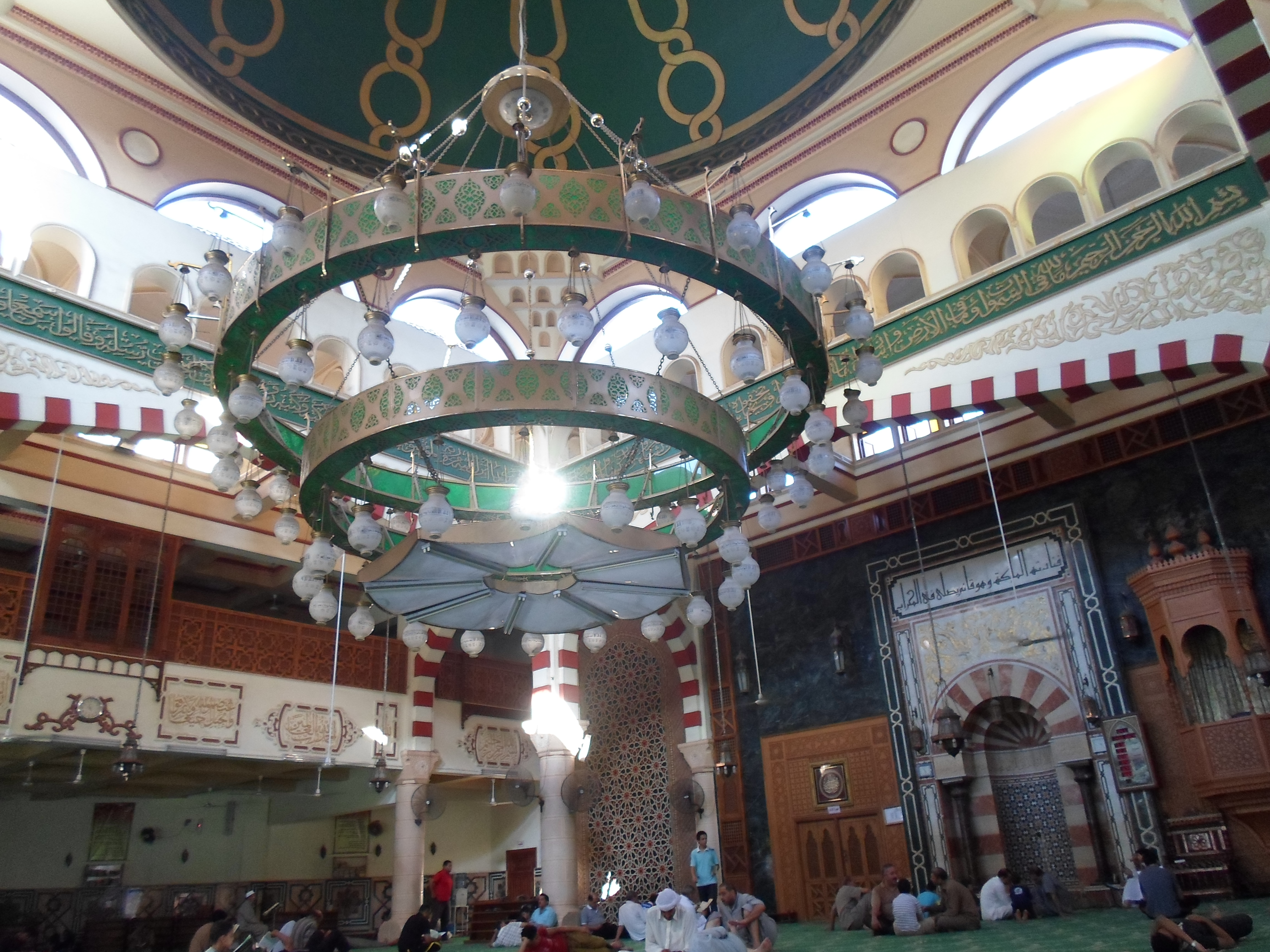 مسجد ناصر (الاتوبيس ) مدينة دمنهور - البحيرة